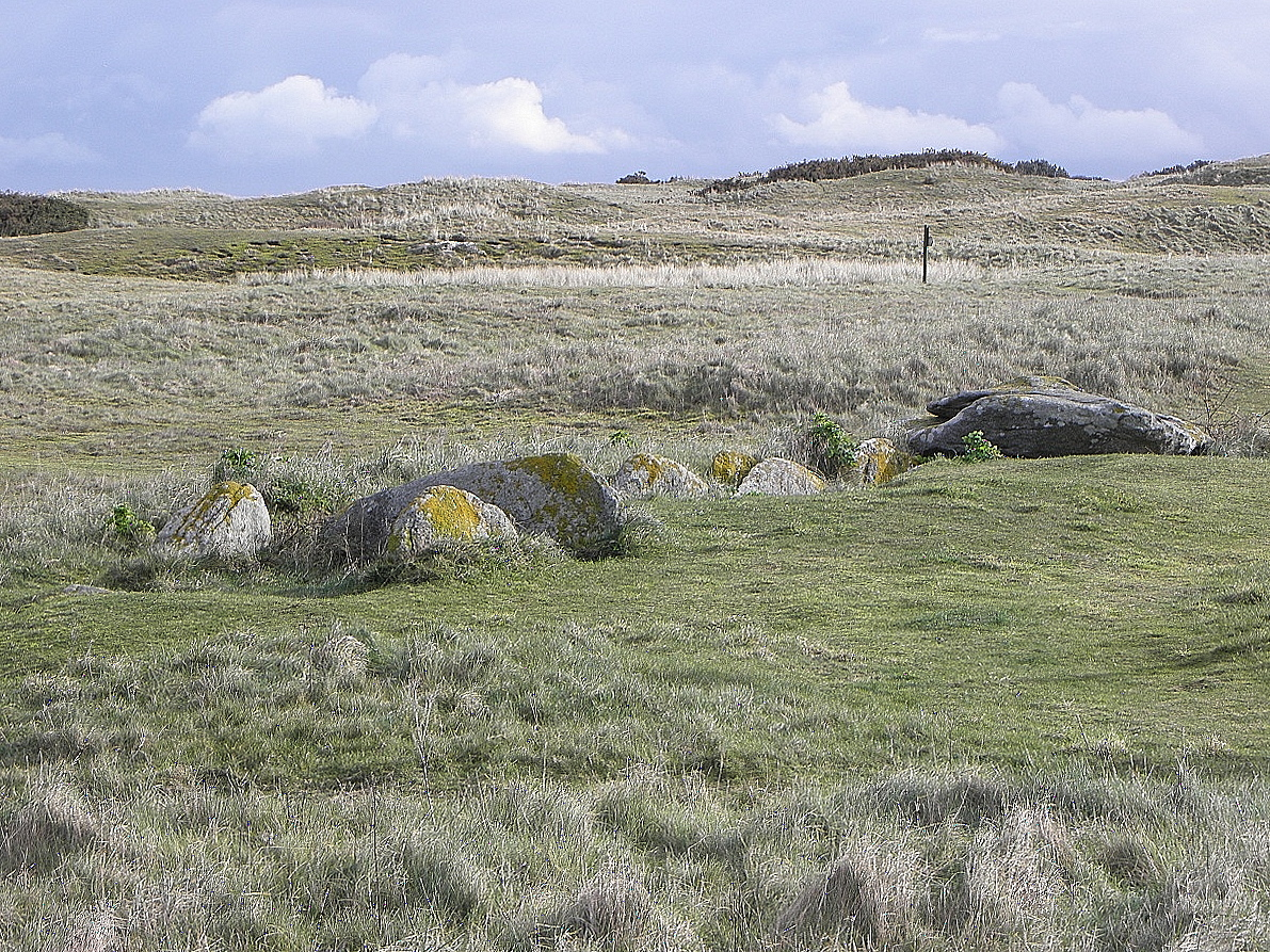 Allée couverte de Pont-ar-Bleiz en Lampaul-Ploudalmézeau (29).